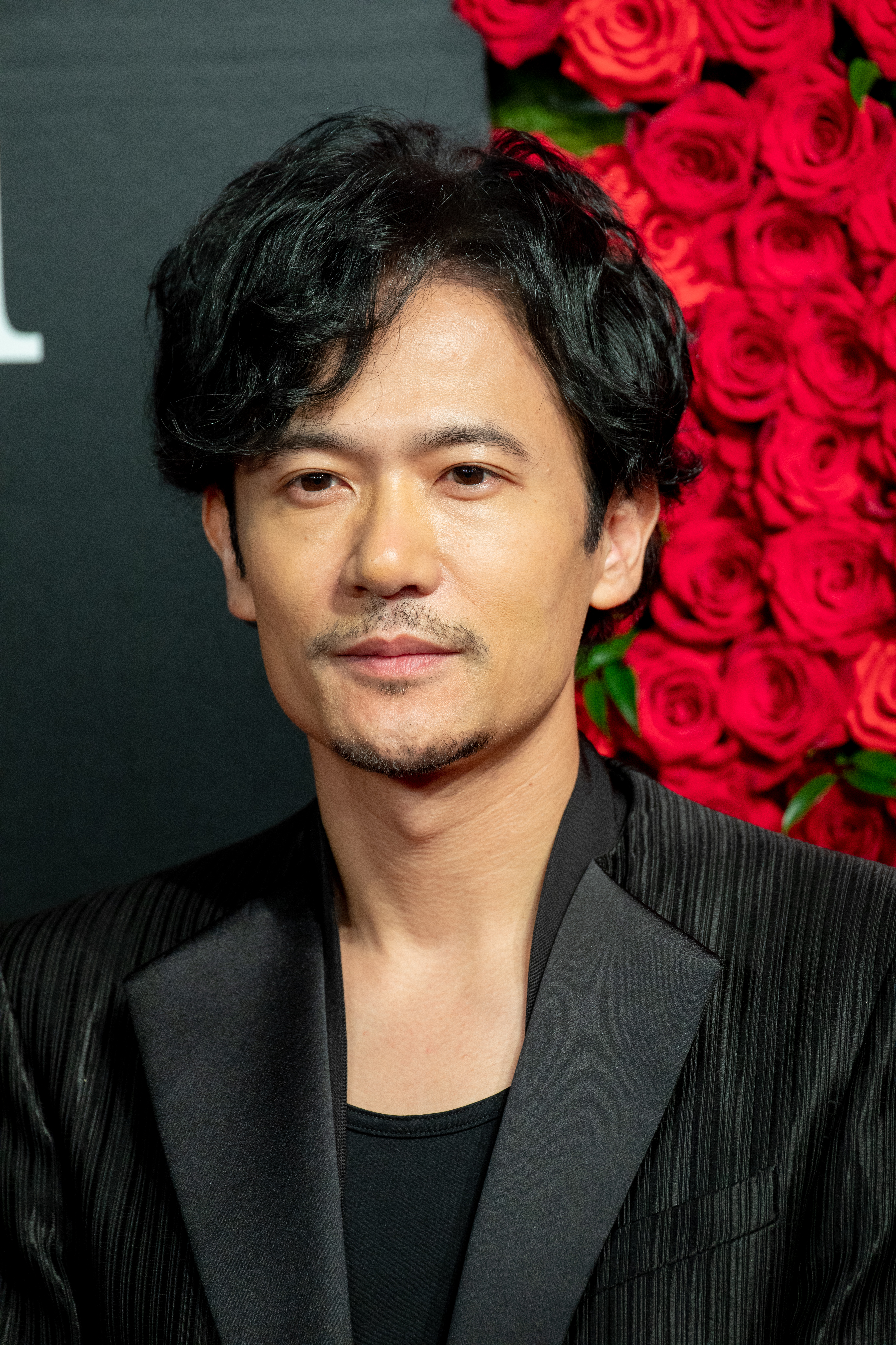 第30回 東京国際映画祭 オープニングセレモニー 稲垣吾郎 (半世界)